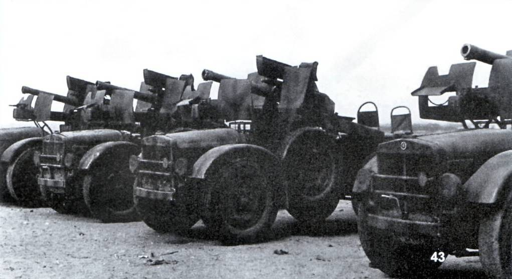 schieramento